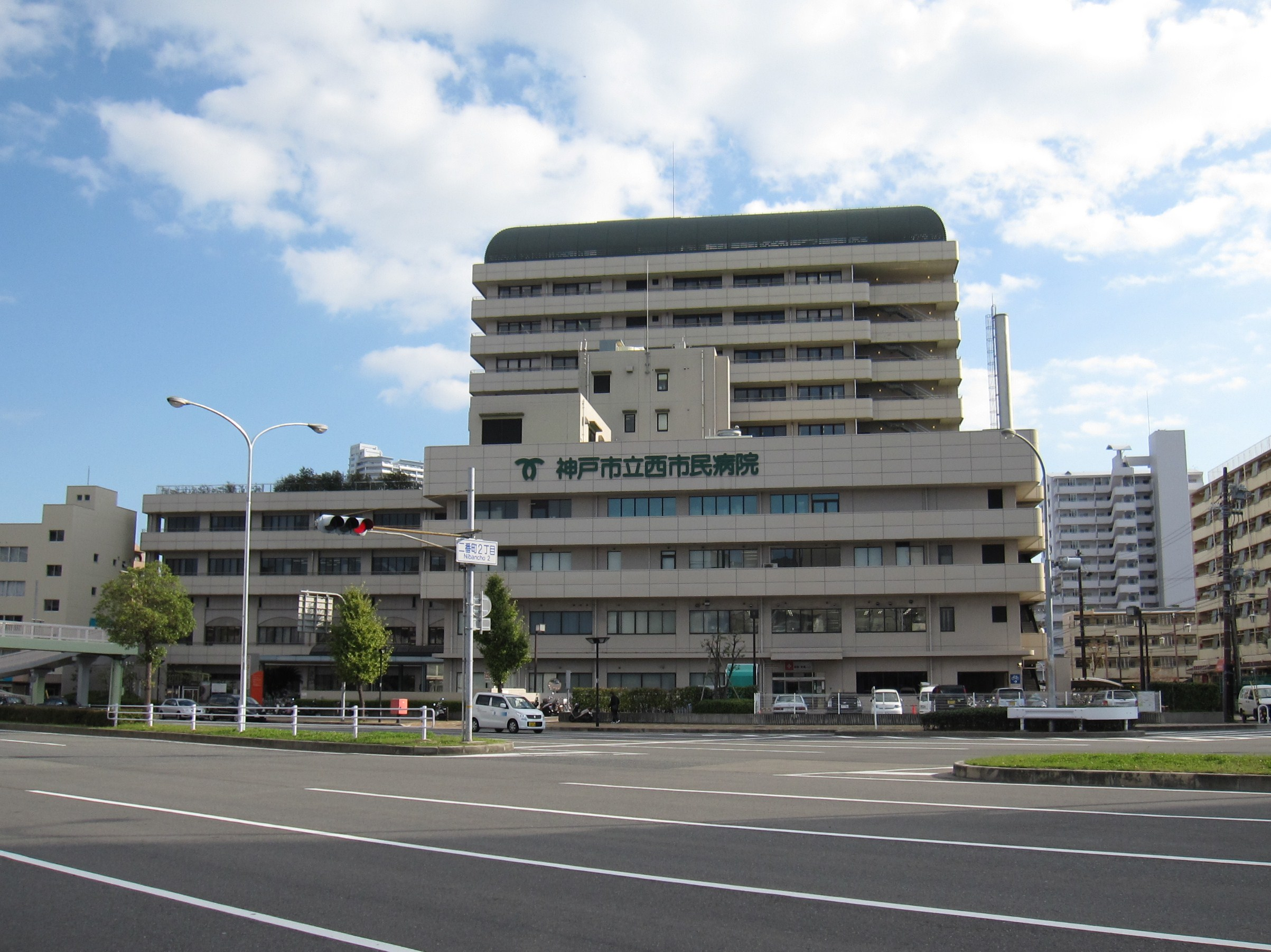 神戸西市民病院